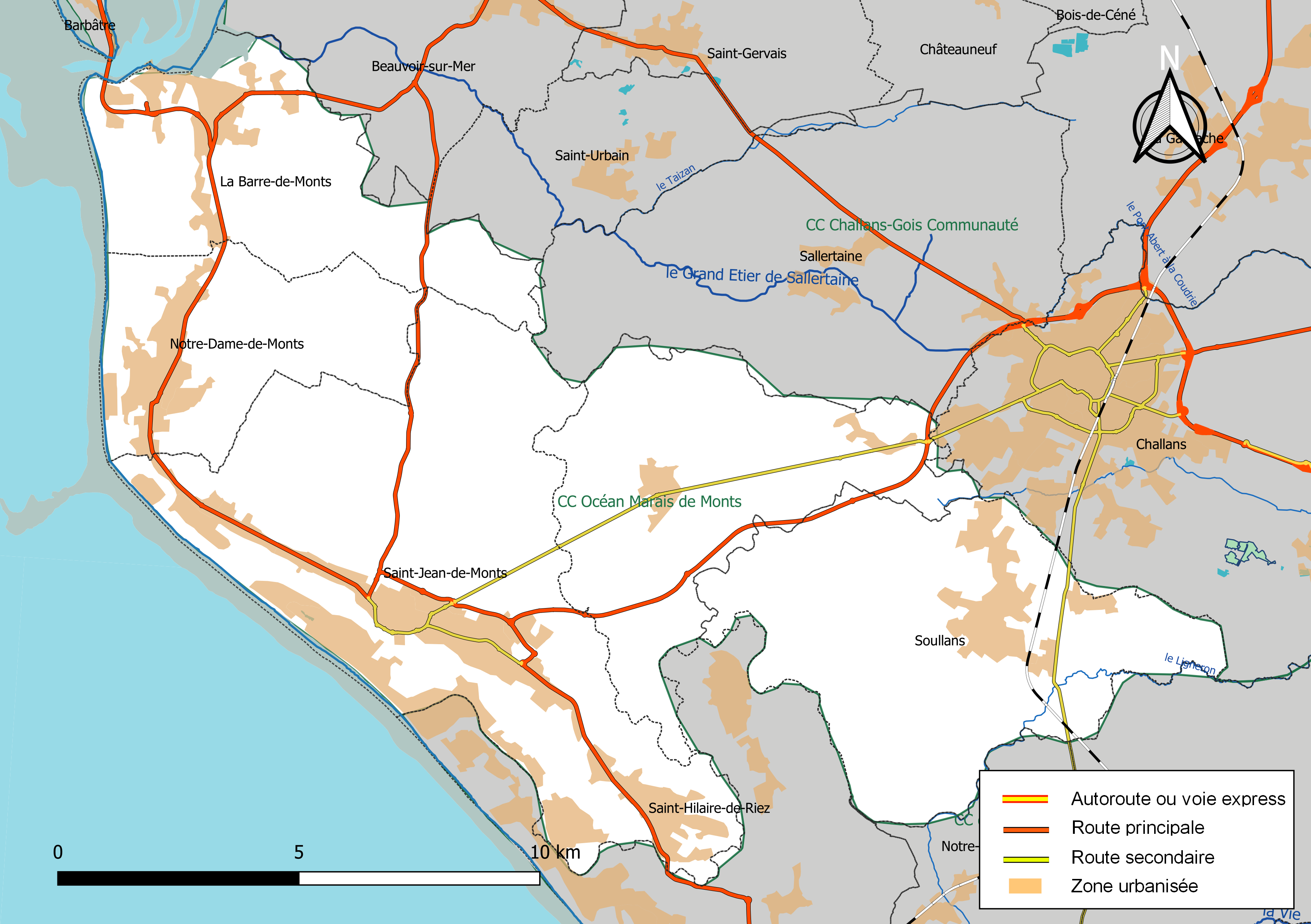 Carte géographique de la Communauté de communes Océan marais de Monts, département de la Vendée, France. Composition au 1er janvier 2019.